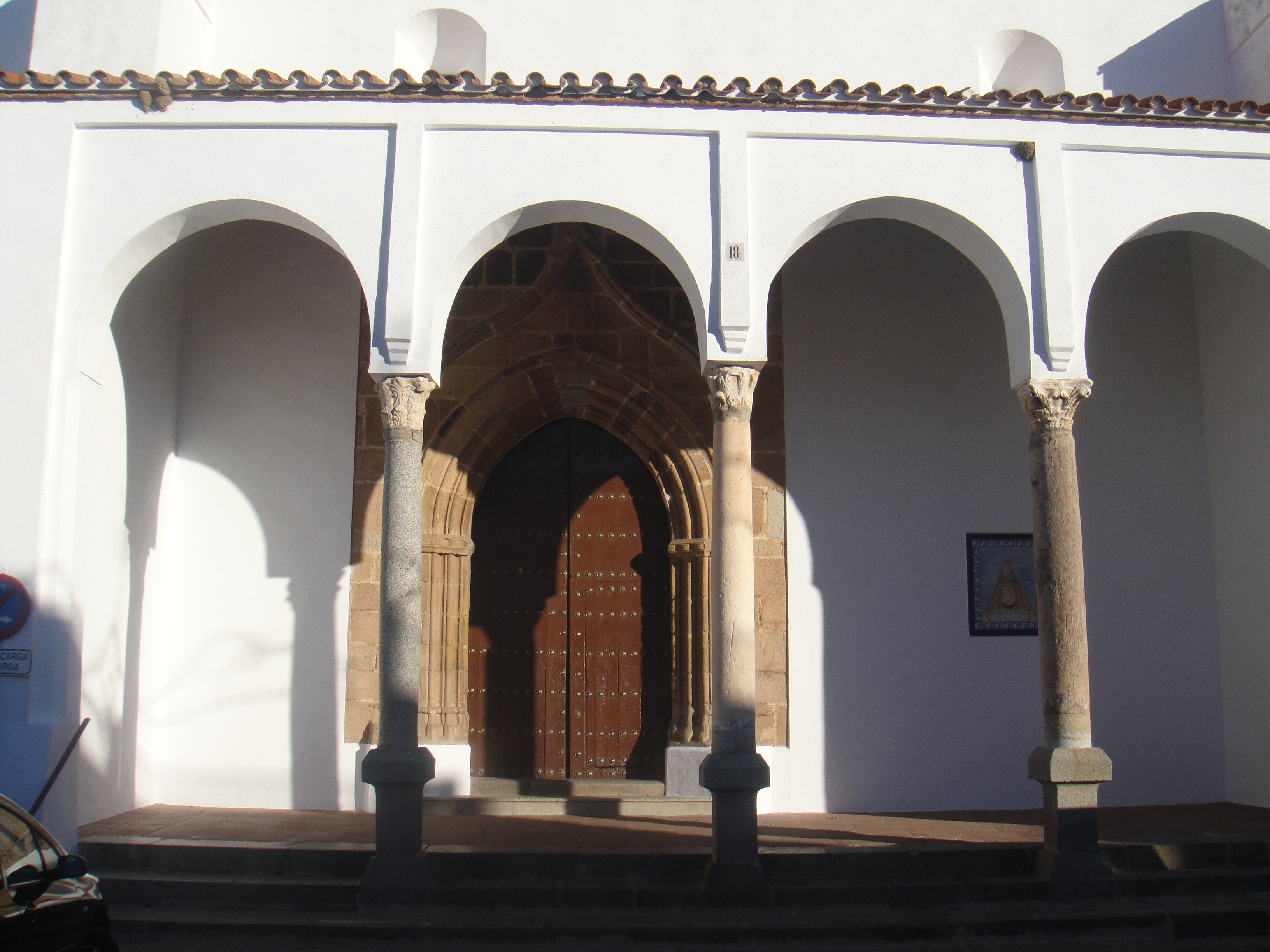 Portada del lado de la Epístola de la iglesia de Nuestra Señora del Castillo de Fuente Obejuna, provincia de Córdoba, (España).